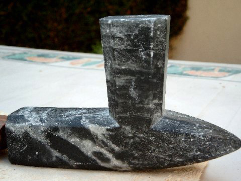 Image fournie par Ethnomusimaniac pour illustrer l'article sur le calumet. ©éréales Kille® | | ☺ | en ce 22 août 2006 à 12:08 (CEST)